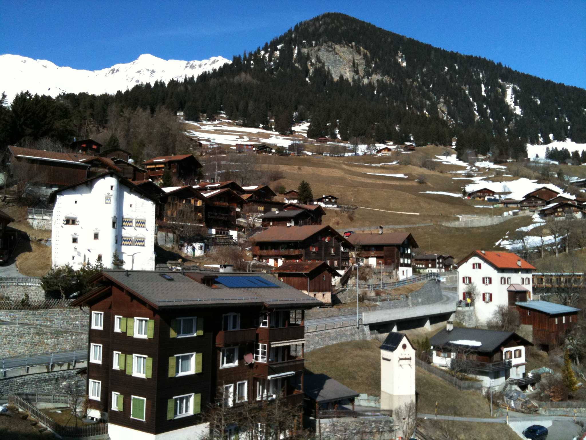 Castiel im Schanfigg